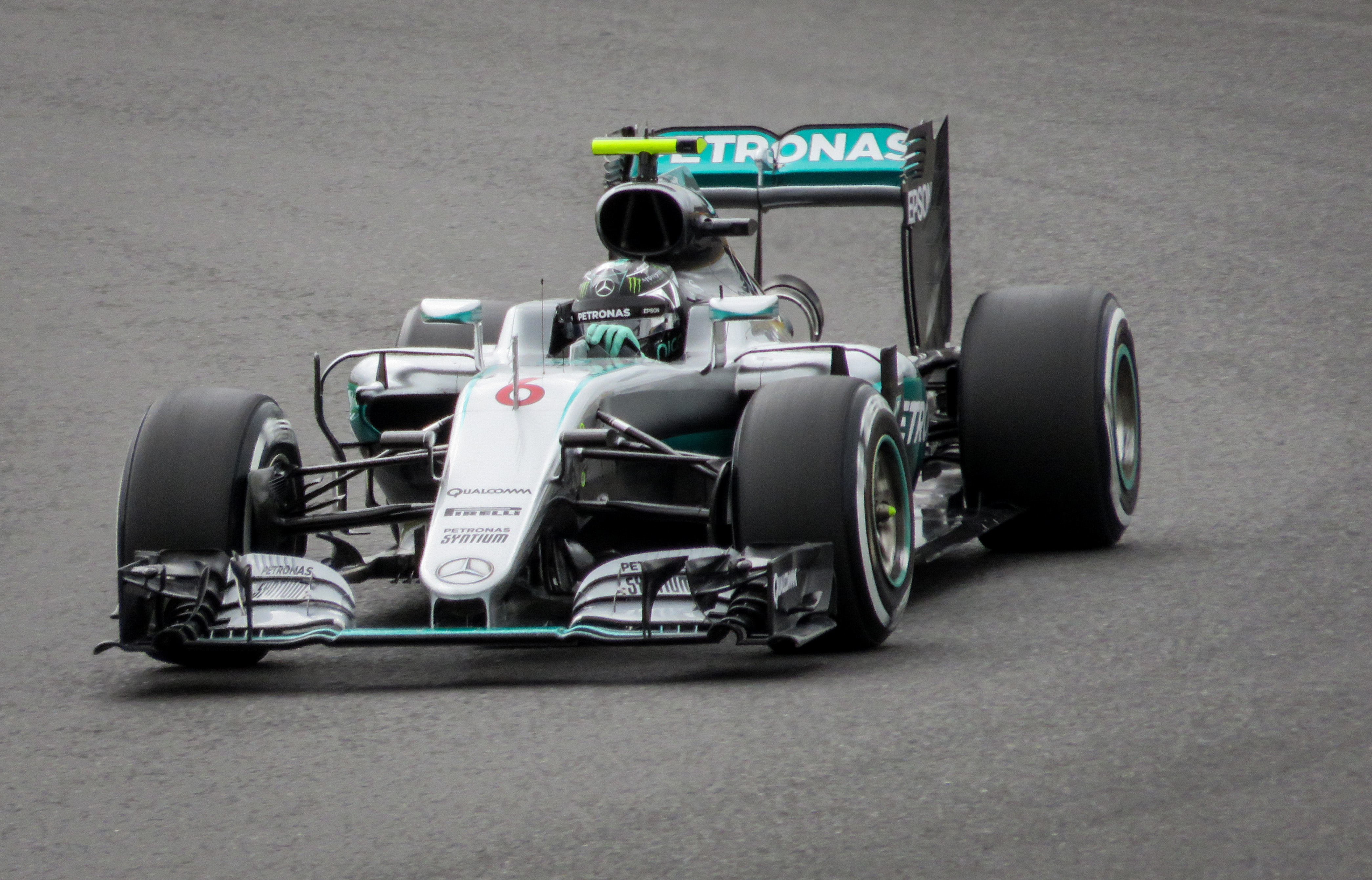 F1 - Mercedes AMG - Nico Rosberg